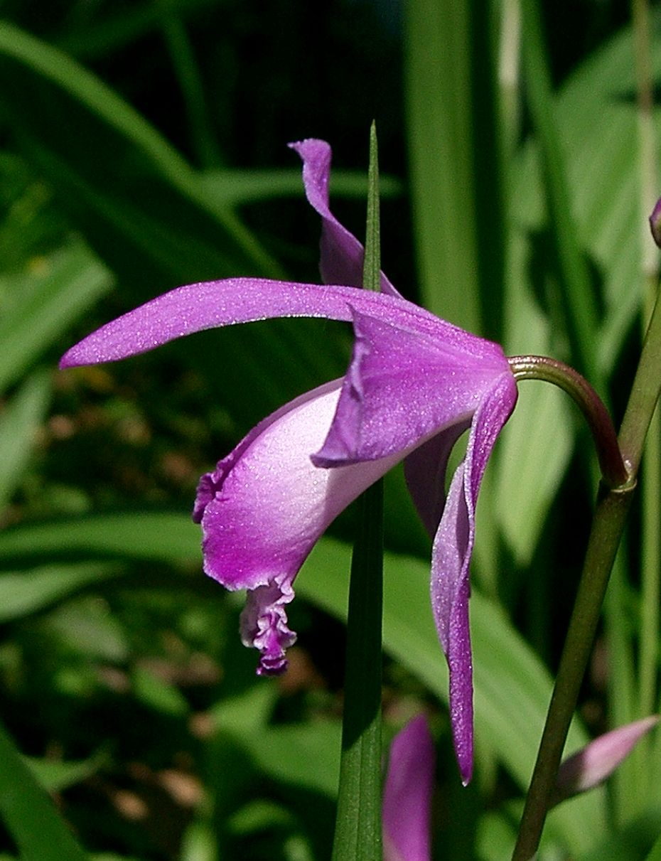 Bletilla striata